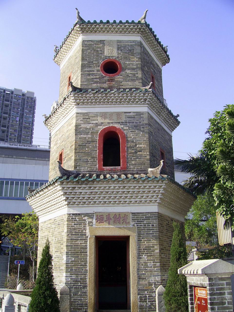 中文（香港）: 聚星樓